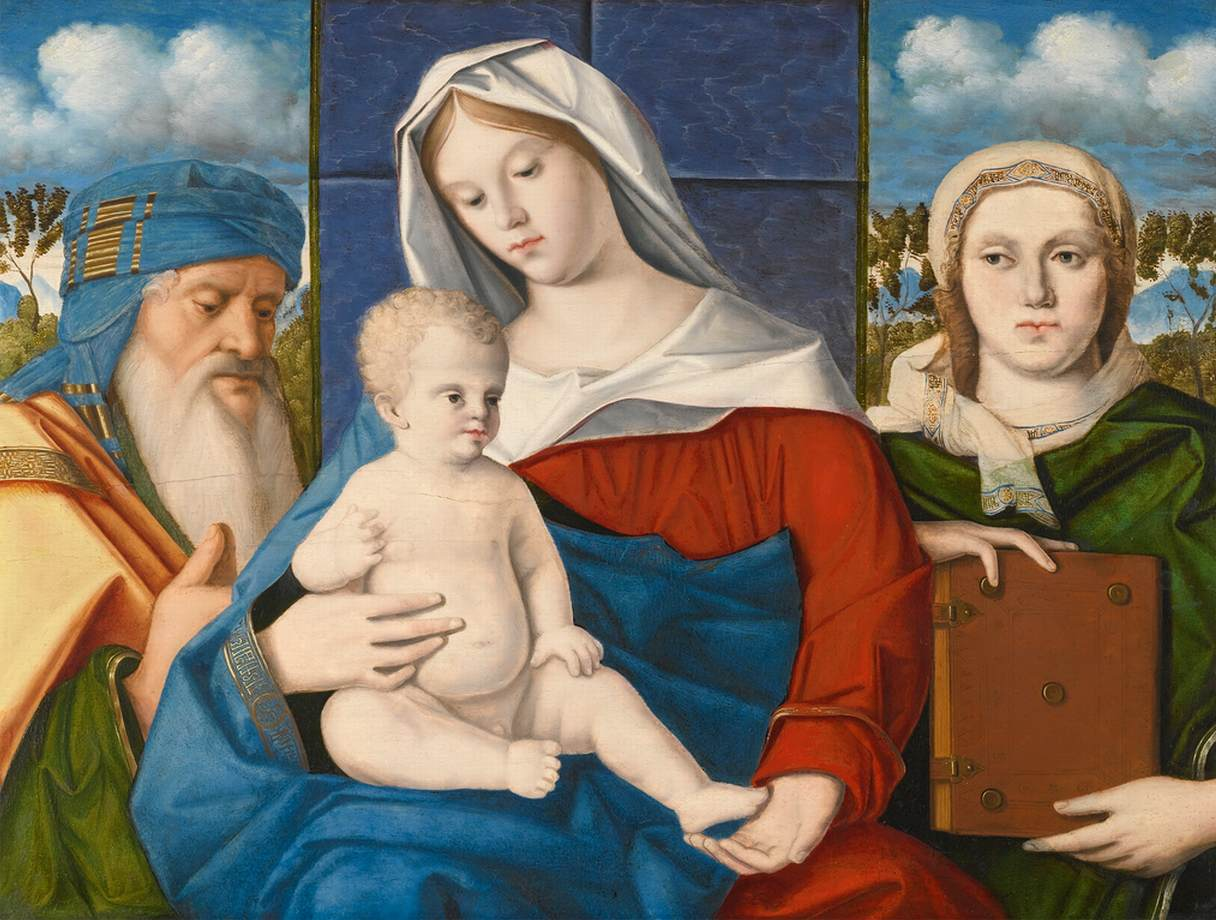 Marco Bello - Sacra Conversazione olio su pannello 64 x 84 cm Collezione privata